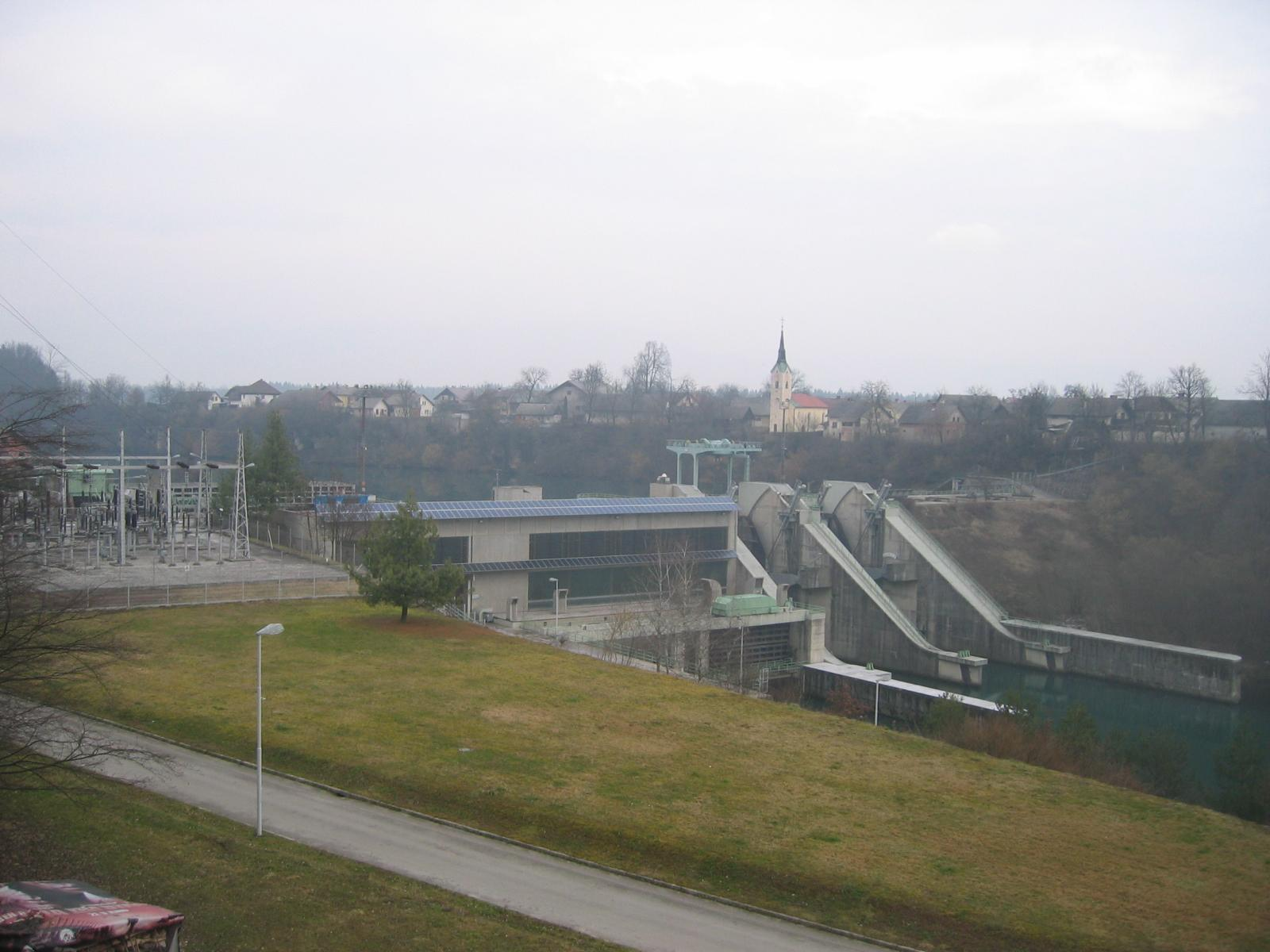 Hydroelectric power plant Mavčiče, on river Sava, Slovenia photo:Ziga 15:15, 26 February 2007 (UTC)